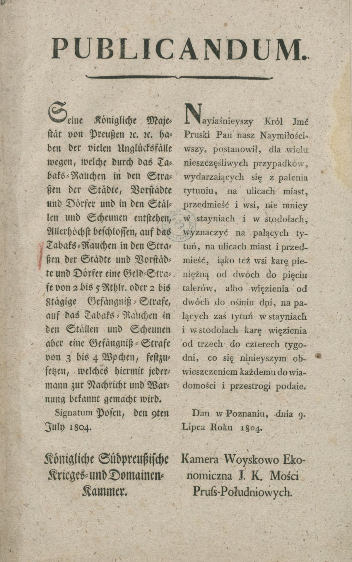 Bekanntmachung zum Verbot des Tabak-Rauchens